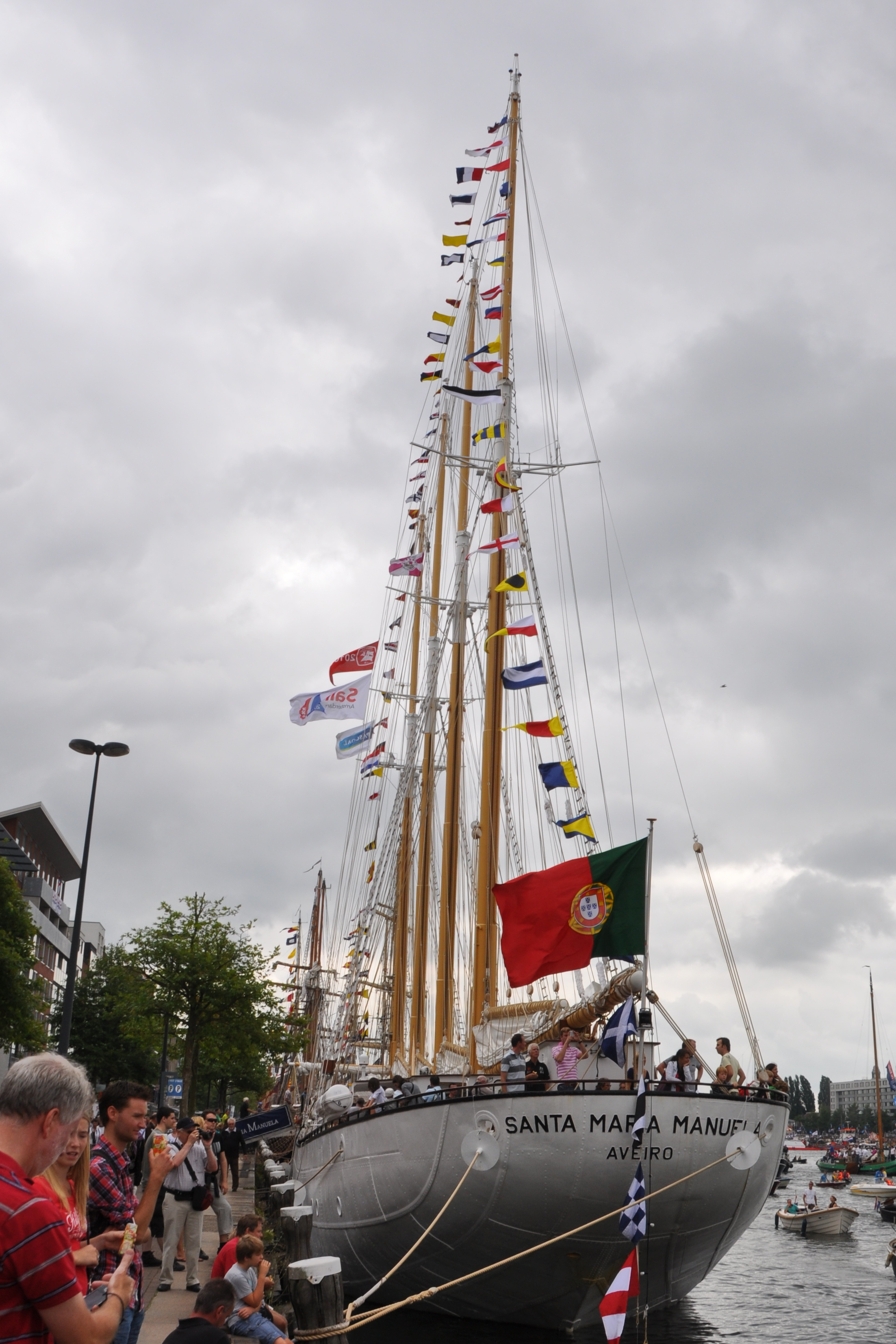 De SANTA MARIA MANUELA op SAIL Amsterdam 2010.